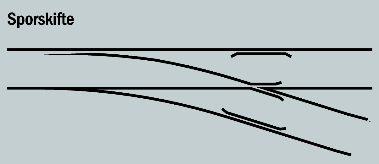 Sporskifte